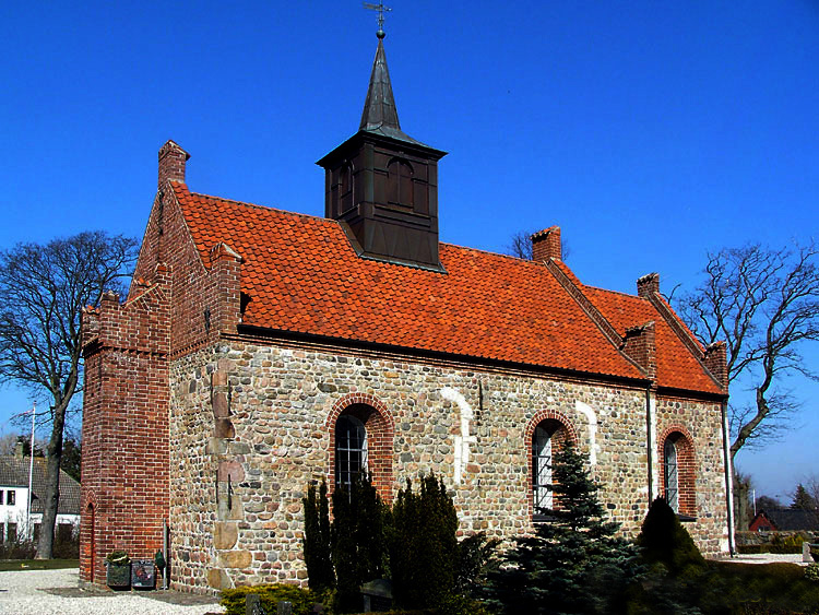 fra sydvest